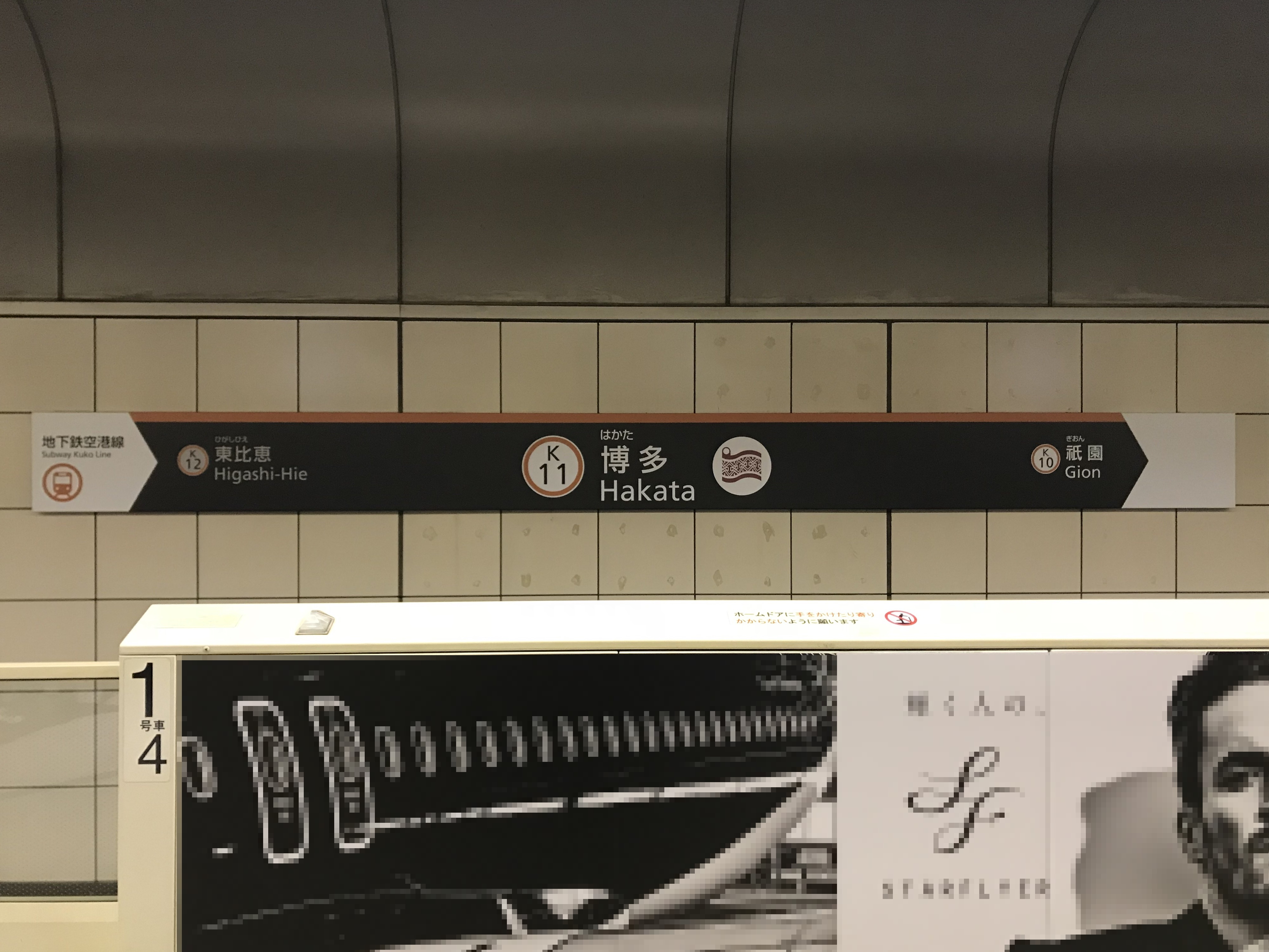 博多駅(福岡市営地下鉄)の駅名標。イラストは博多織